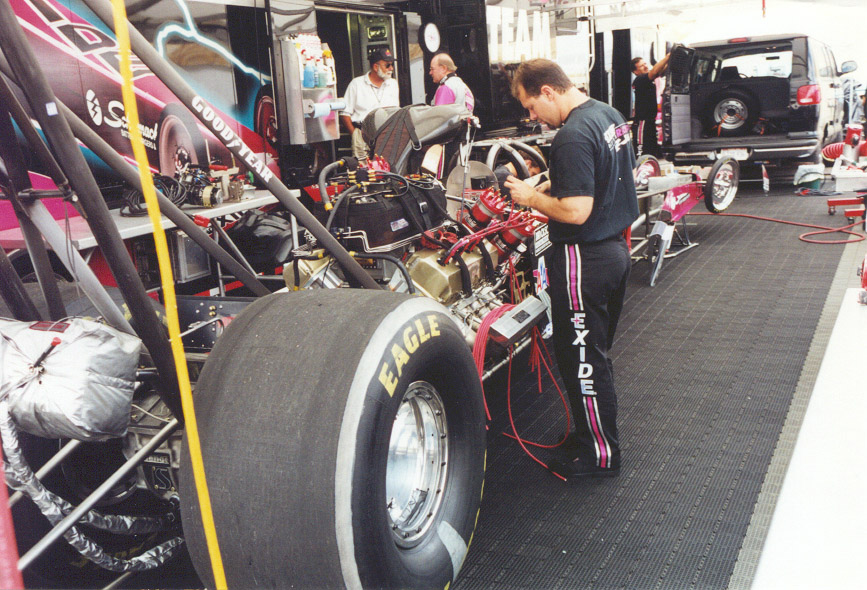 Tony Schumacher pit, Denver 1999Tony Schumacher